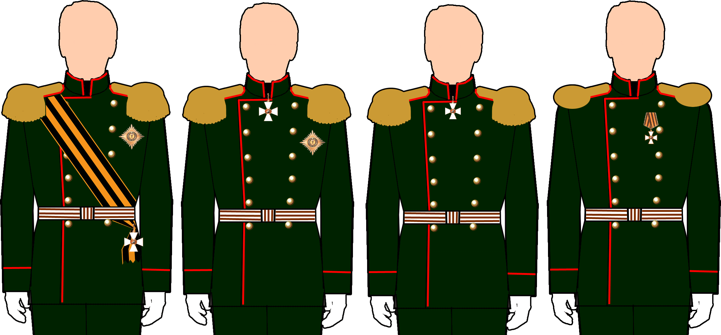 Российская империя Схема размещения орденских знаков Ордена Святого Георгия.